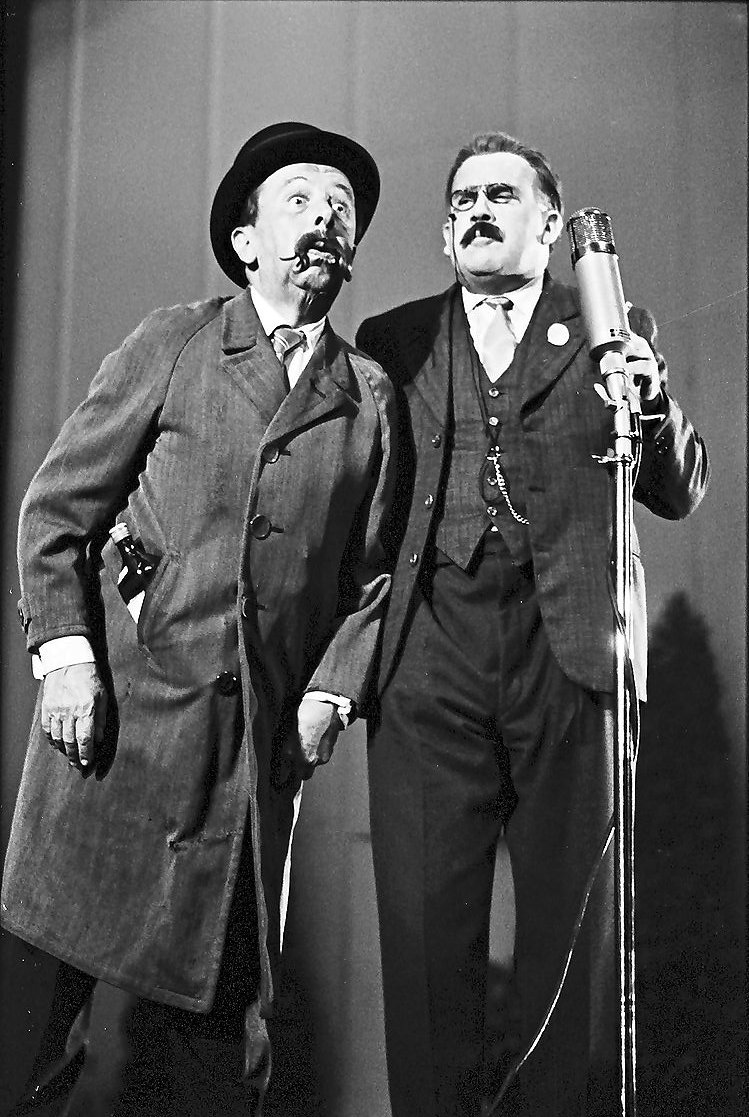 Variété Programm Mez: Häberle und Pfleiderer; Willy Reichert und Oscar Heiler